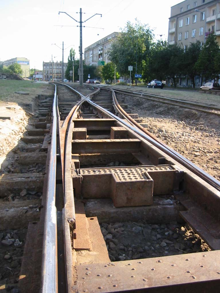 Zwrotnica tramwajowa w Łodzi